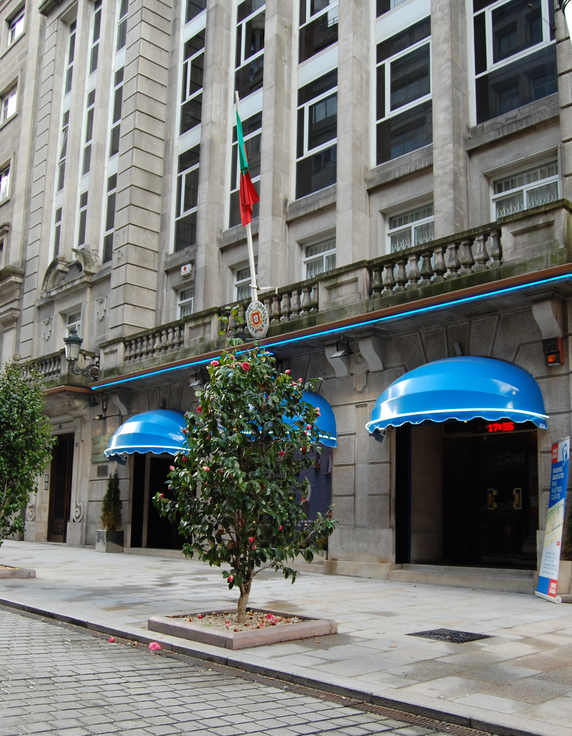 Consulado de Portugal em Vigo (rua Marqués de Valadares).